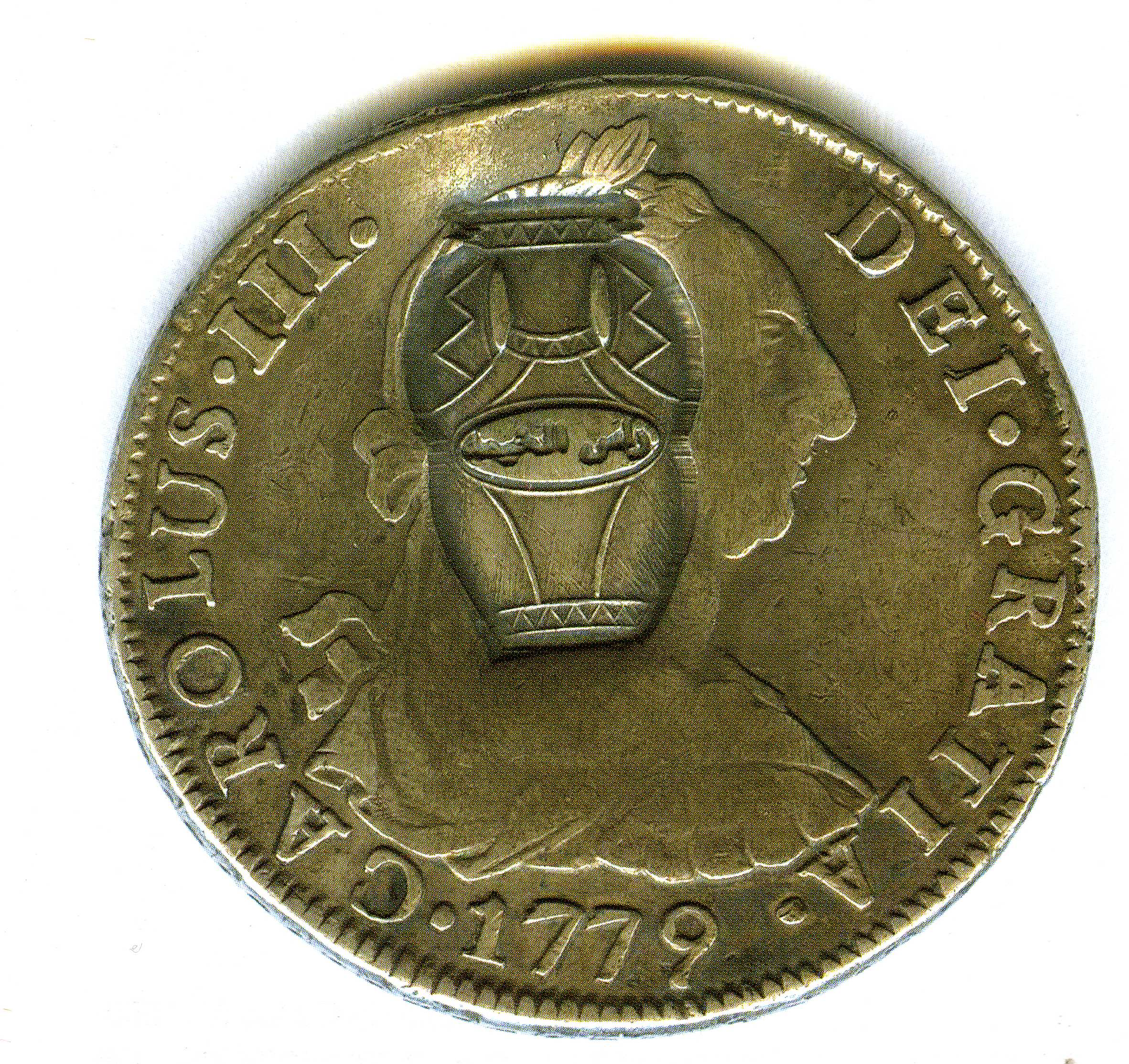 Moneda con resello que circuló en Ras al Jaima.